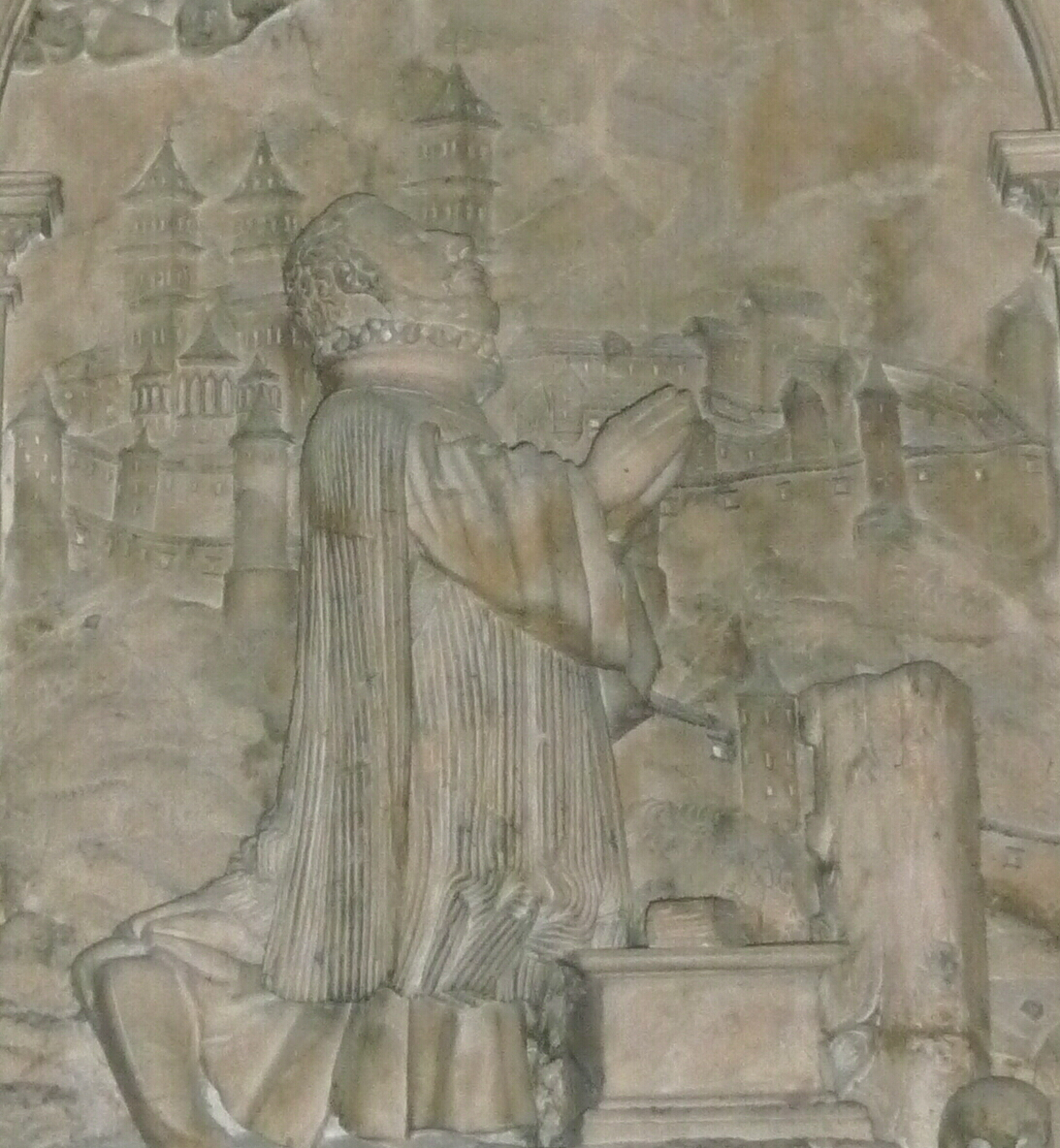 Erasmus Neustetter genannt Stürmer und die Comburg, Epitaph im Würzburger Dom